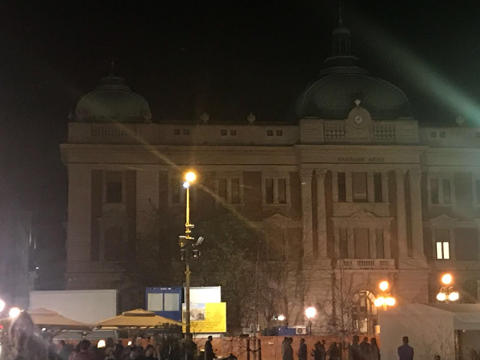 Народни музеј у Београду